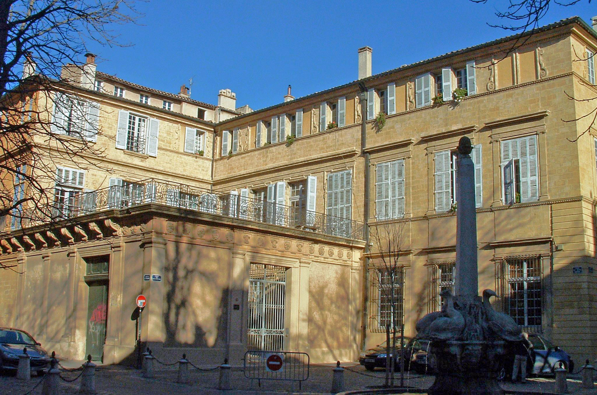 Aix-en-Provence - Hôtel de Boisgelin - Ensemble côté place des Quatre-Dauphins